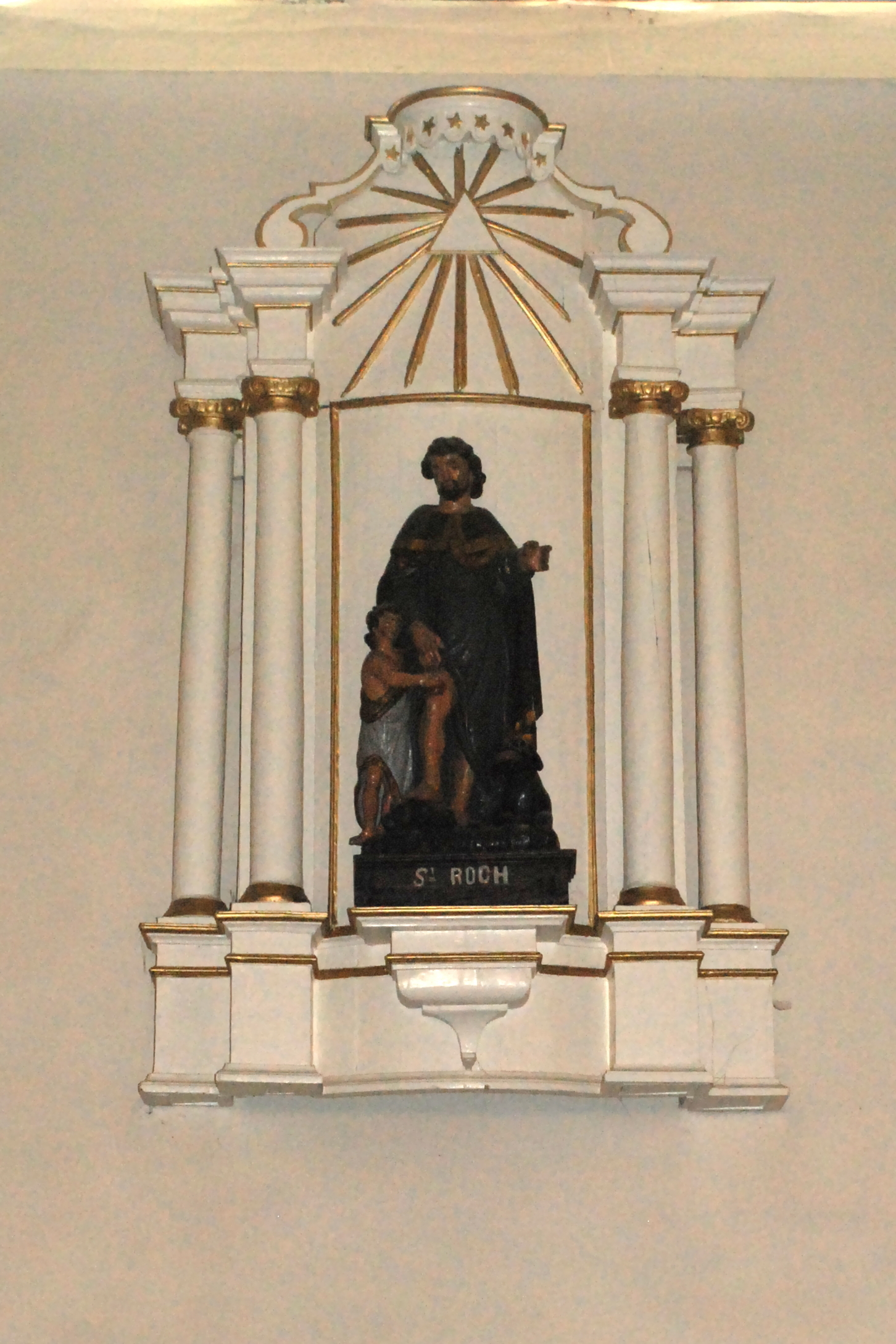 Belgique - Province de Namur - Viroinval - Nismes - église Saint-Lambert (1829)